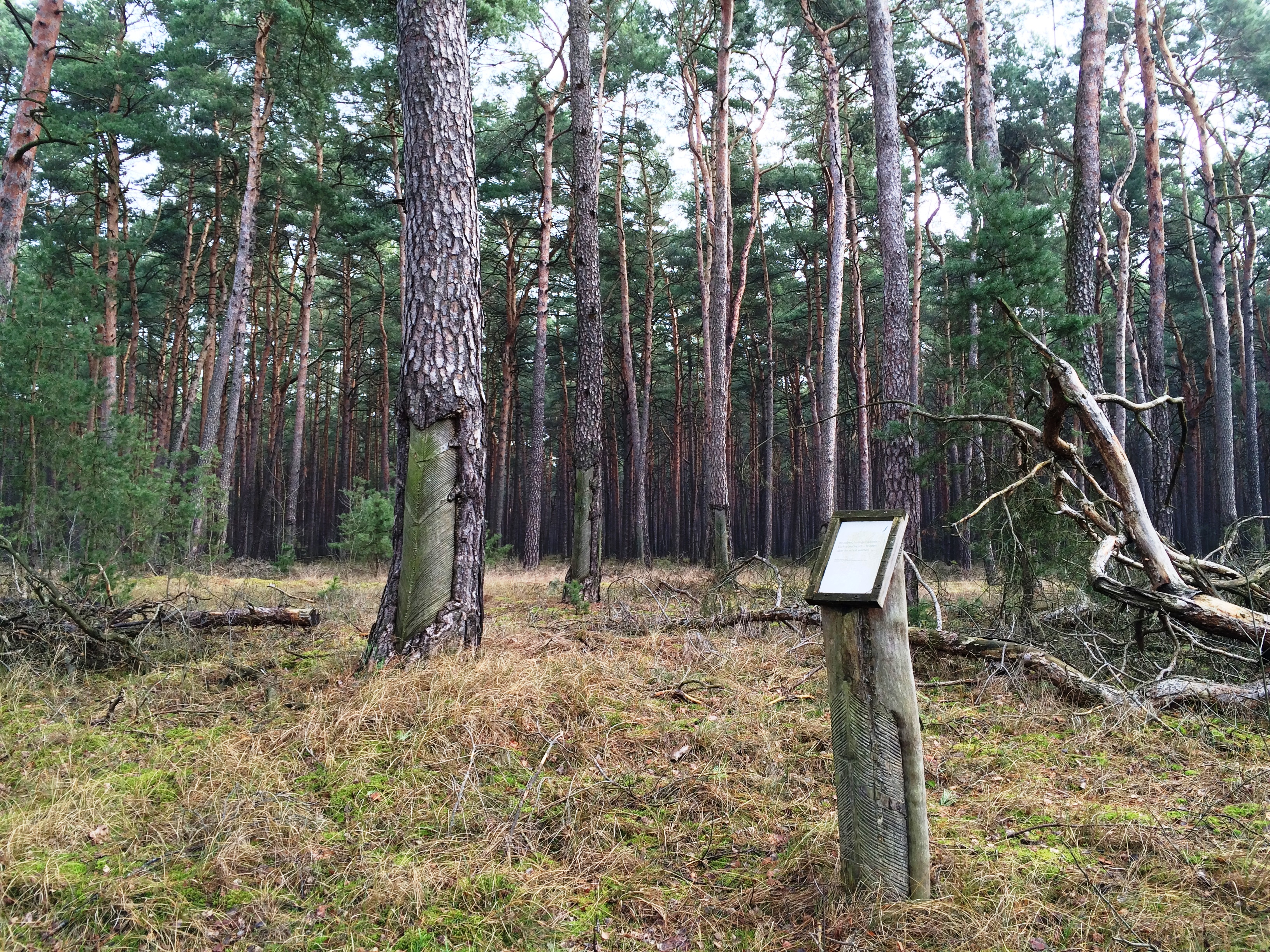 Die Lesefährten Waldweisen ist ein rund 20 km langer touristischer Lehrpfad in Märkisch Buchholz im Landkreis Dahme-Spreewald in Brandenburg. Der Landesbetrieb Forst Brandenburg hat entlang des Weges gemeinsam mit dem österreichischen Künstler Wolfgang Georgsdorf insgesamt 50 Tafeln mit literarischen Texten aufgestellt, die alle das Thema Wald aufgreifen.